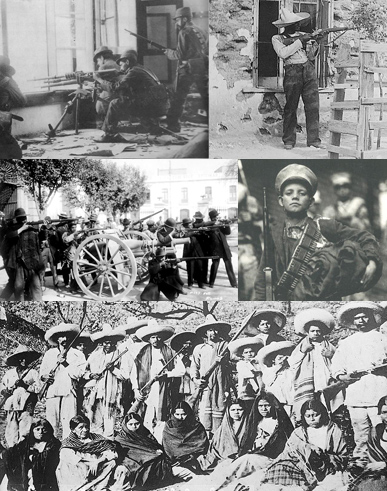 Collage de la Revolución mexicana a partir de varias imágenes (ver abajo)